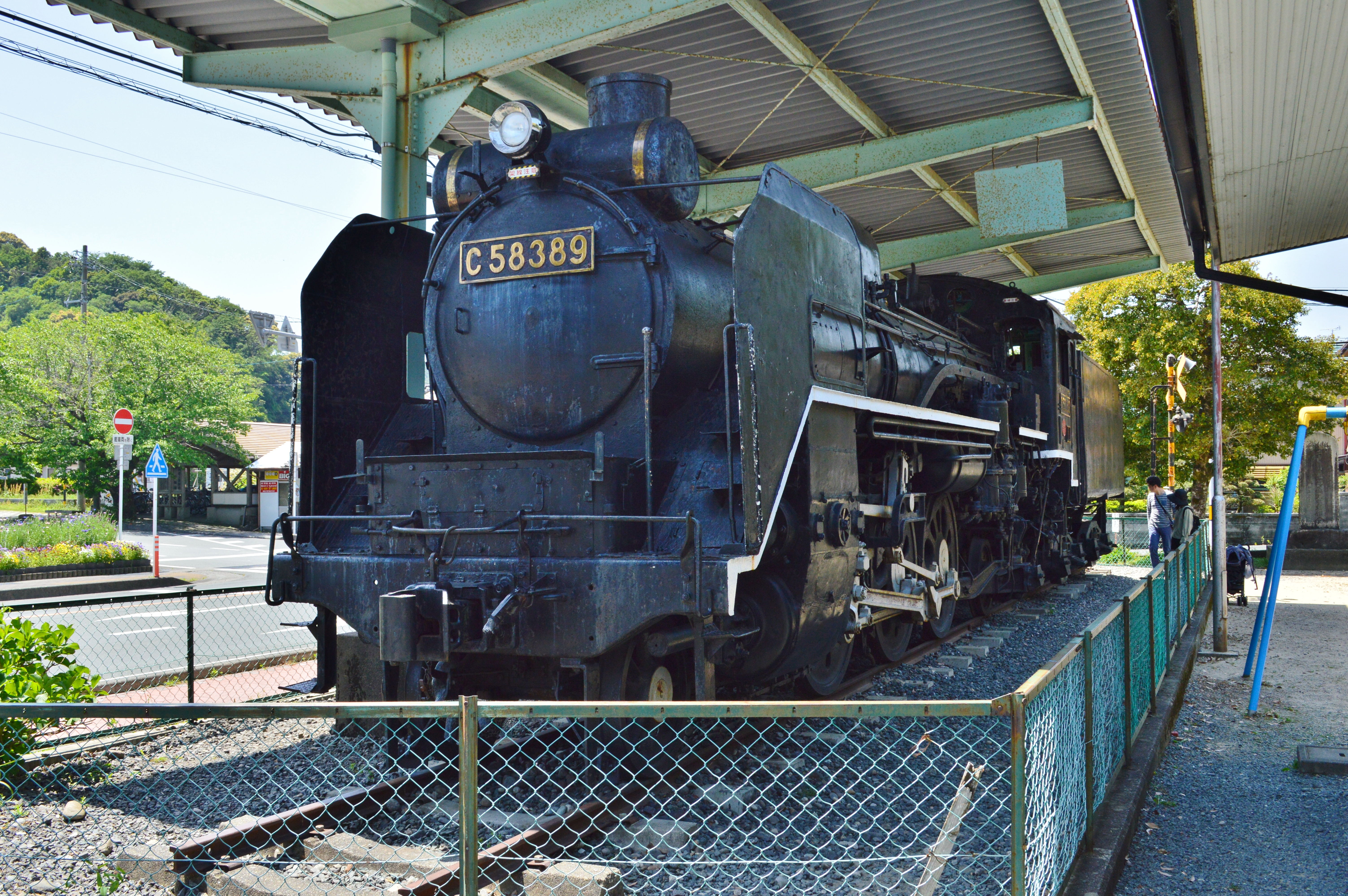 C58 389 (天竜二俣駅前SL公園にて)